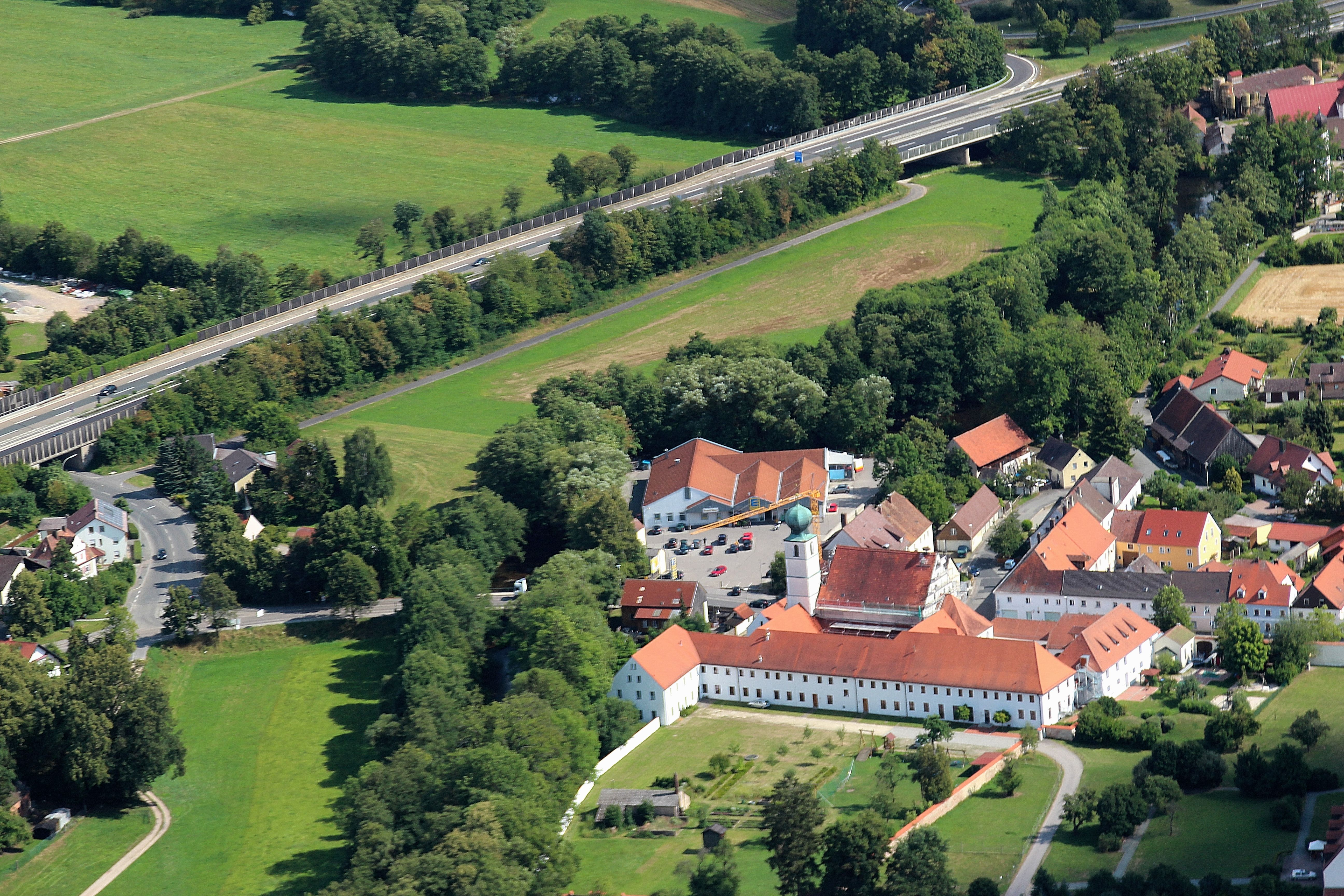 Franziskanerkloster Pfreimd, Stadt Pfreimd, Landkreis Schwandorf, Oberpfalz, Bayern